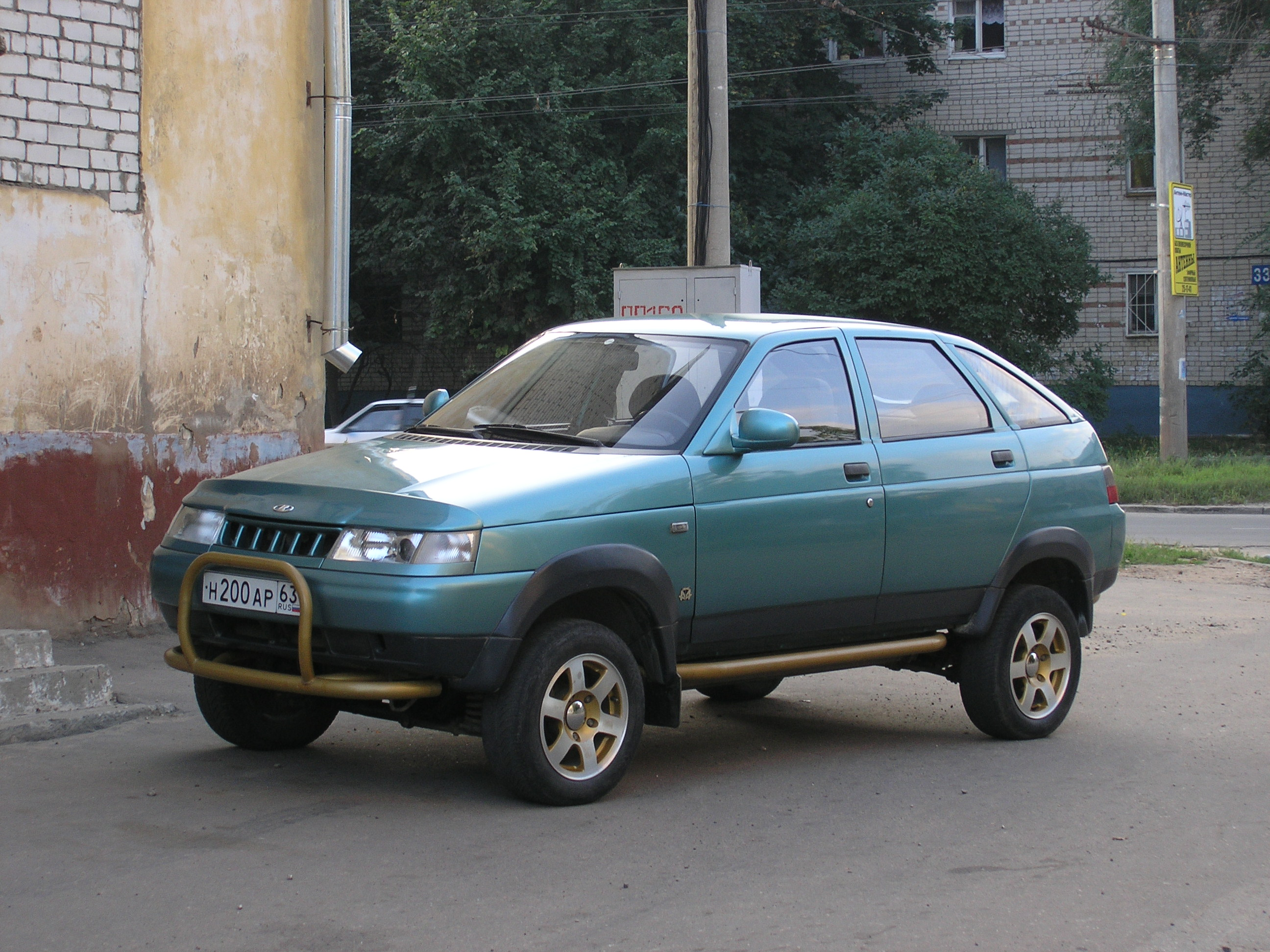 Тарзан - гибрид Нивы и ВАЗ 2112.